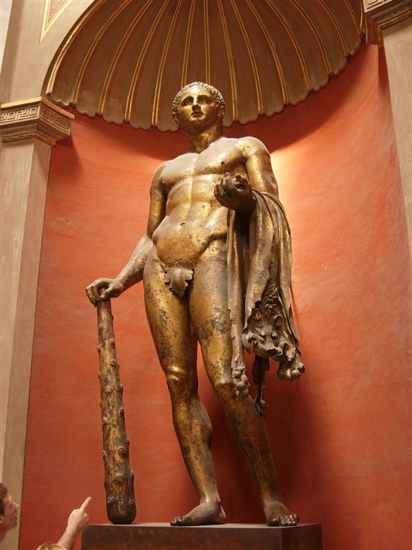 Vatican Pius Clementine Museum